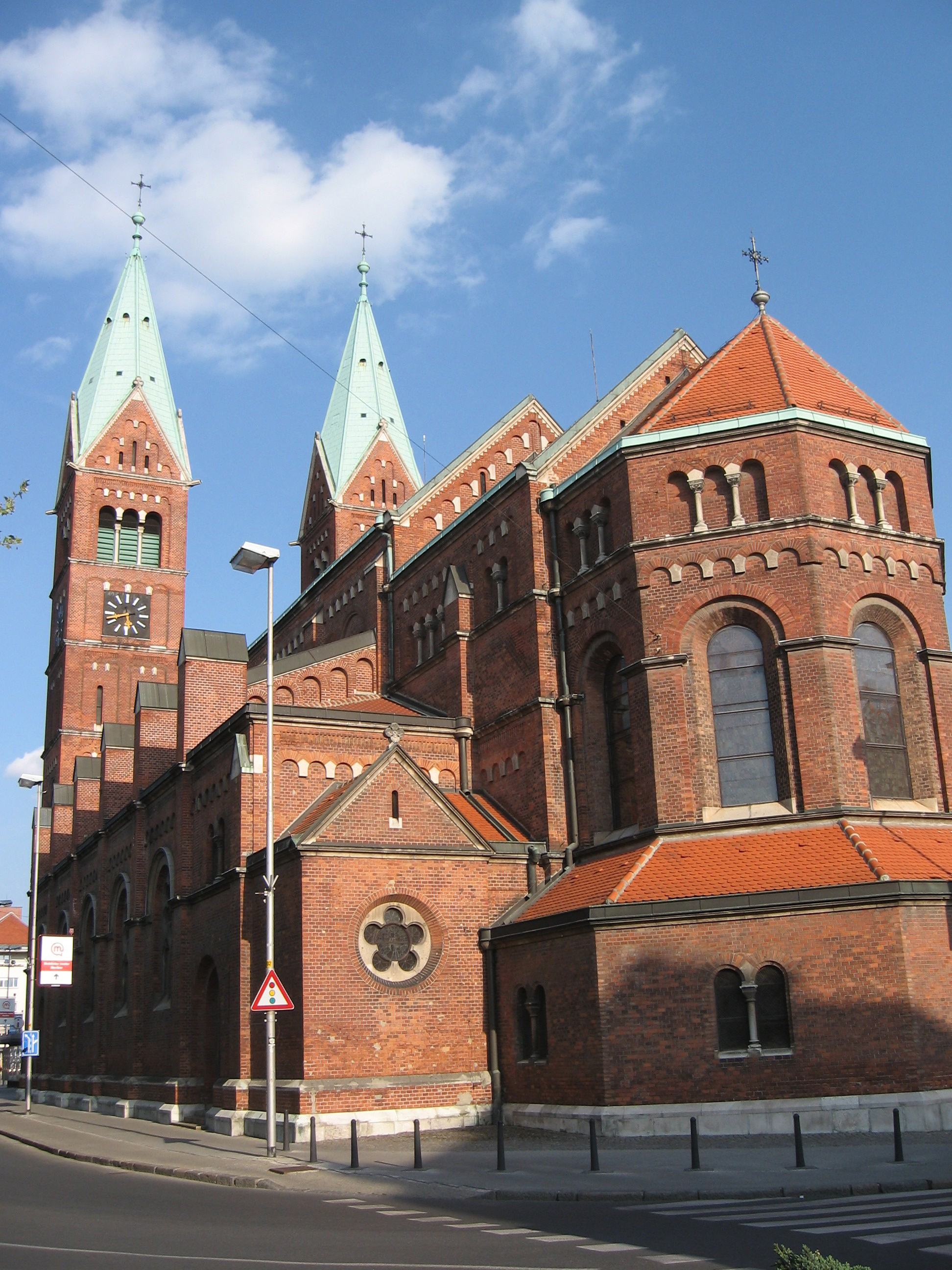 Frančiškanska cerkev, bazilika Matere Usmiljenja (Maribor), 1900